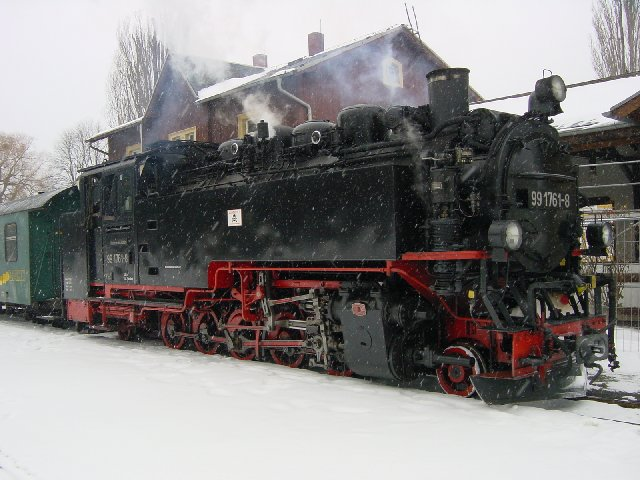 Lößnitzgrundbahn, Dampflokomotive, im Bahnhof Moritzburg.